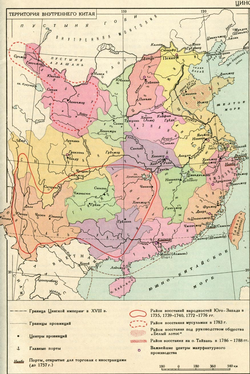 Территория Внутреннего Китая